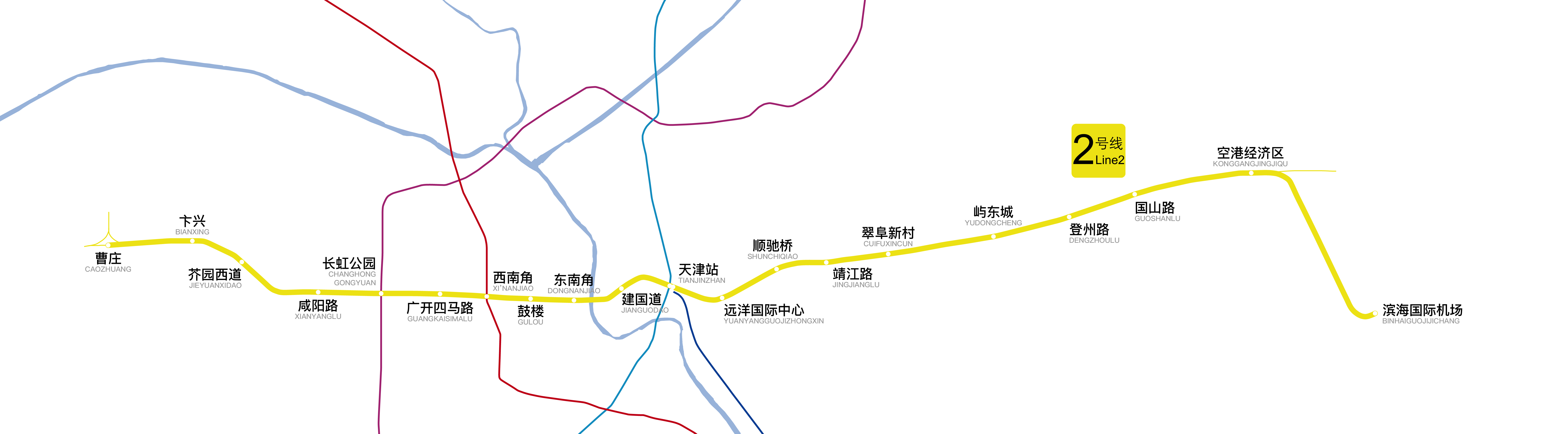 中文（中国大陆）: 天津地铁2号线线路图，更新于2018年6月